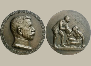 Curt von Pfuel (1849-1936), General der Kavallerie, Generalinspekteur des Militärerziehungs- und Bildungswesens, sowie Vorsitzender des Zentralkomitees der deutschen Vereine vom Roten Kreuz.